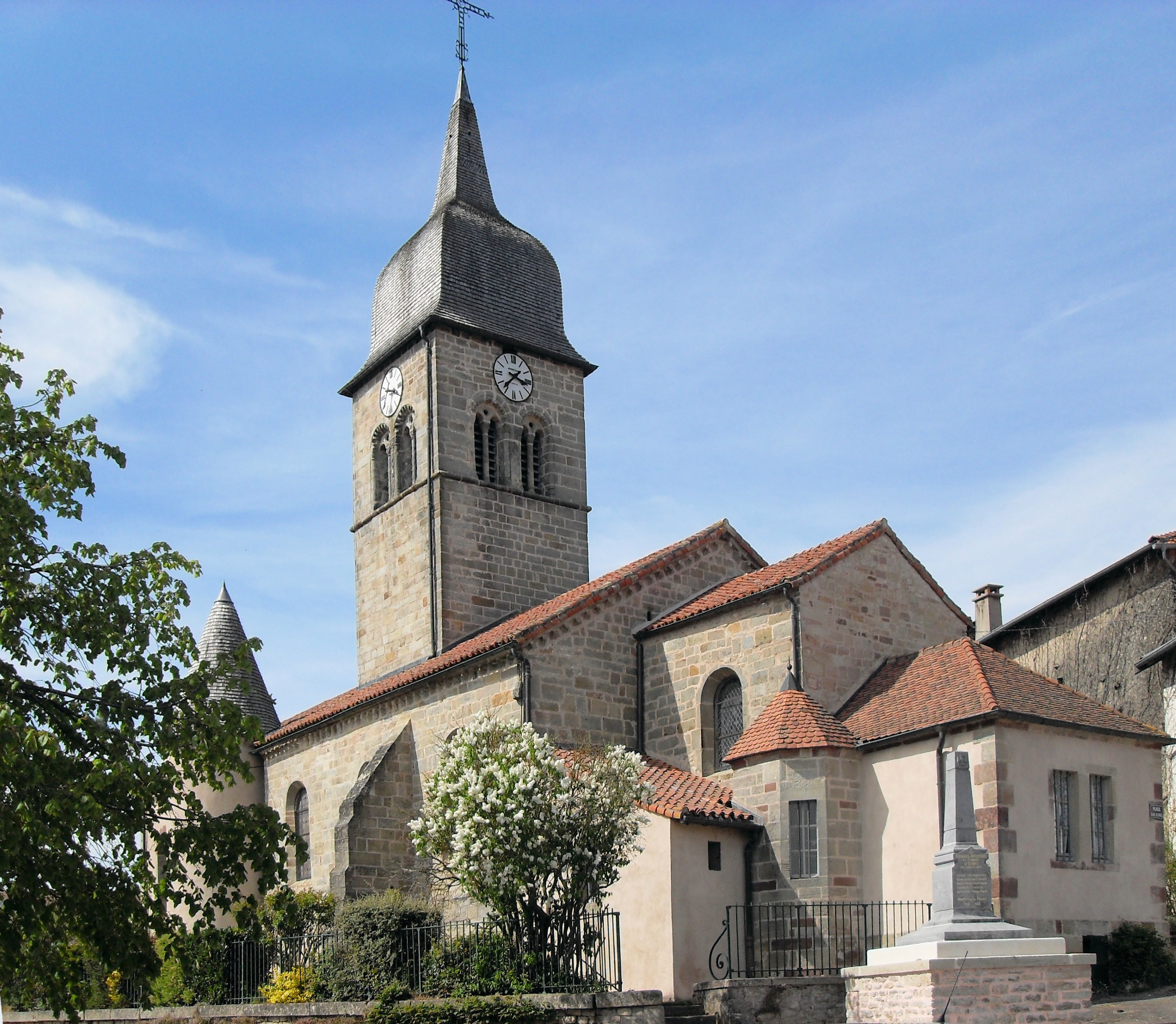 L'église Saint-Brice d'Isches